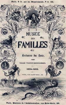 Cover of French periodical "Le Musée des familles"